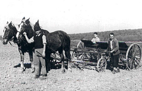 Drillmaschine